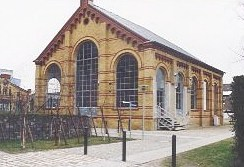 Kunsthalle Luckenwalde selber fotografiert.